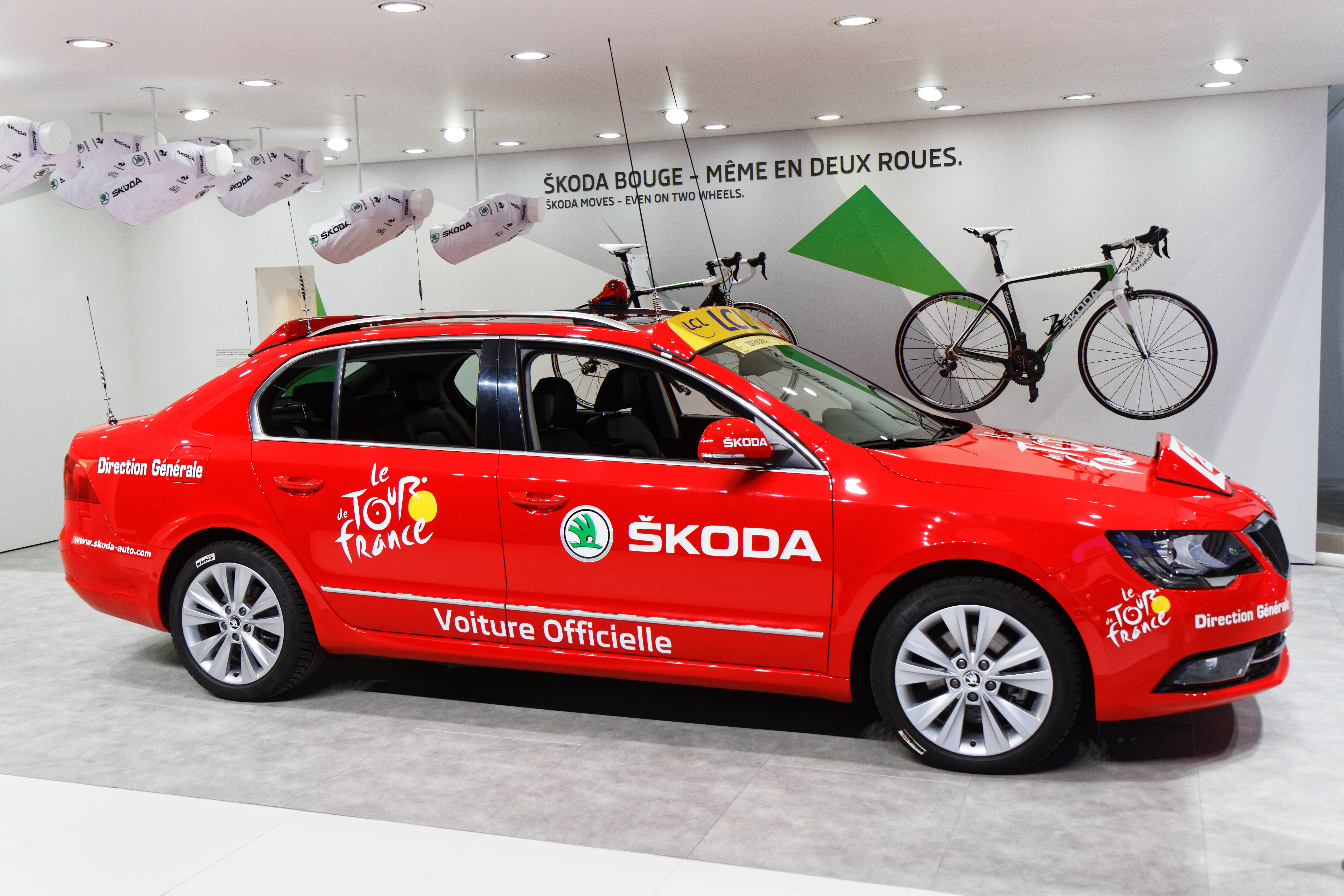 Une Škoda Superb présentée lors du mondial de l'automobile de Paris 2014.